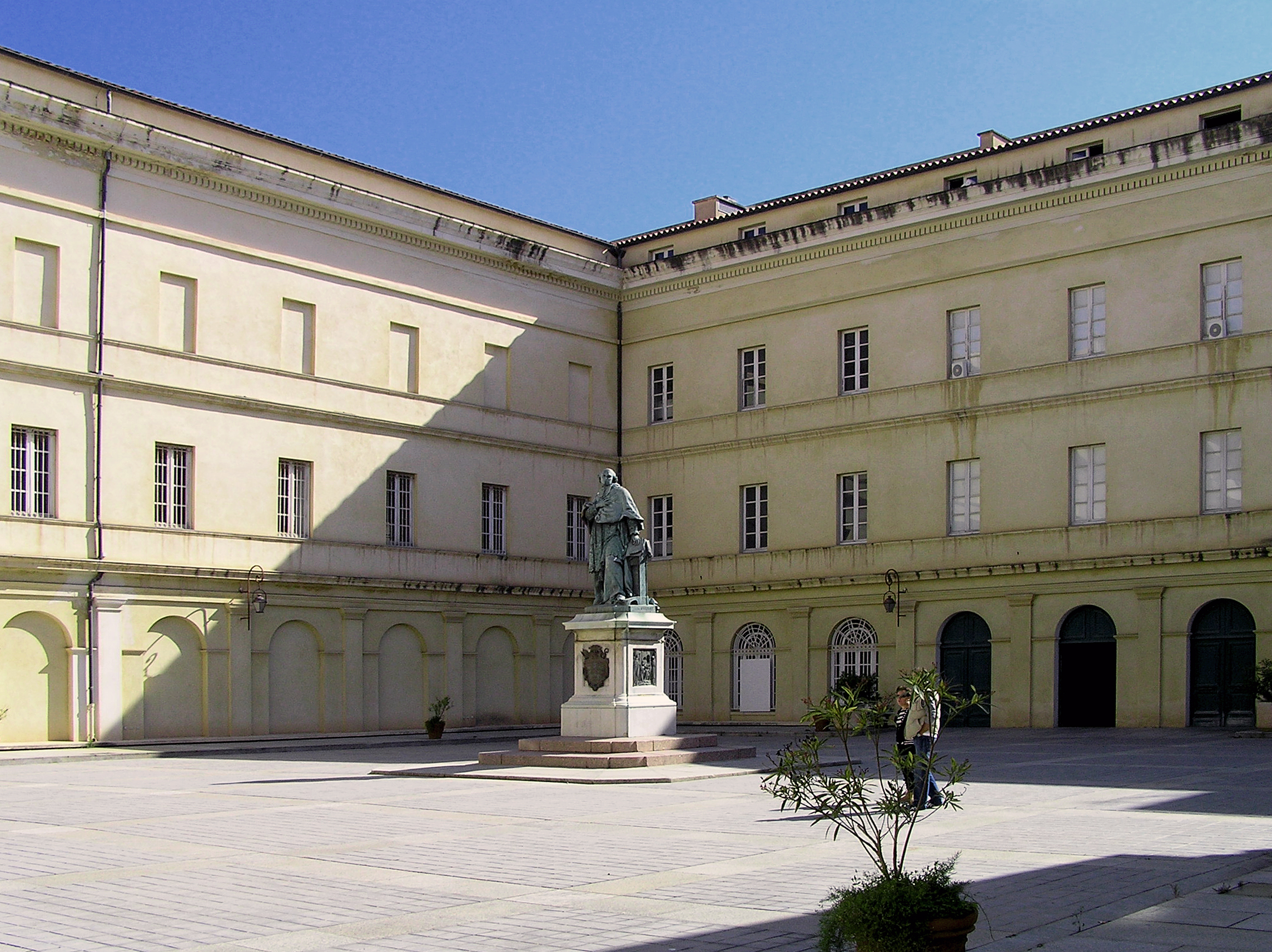 Ajaccio - Musée Fesch ex-Palais Fesch